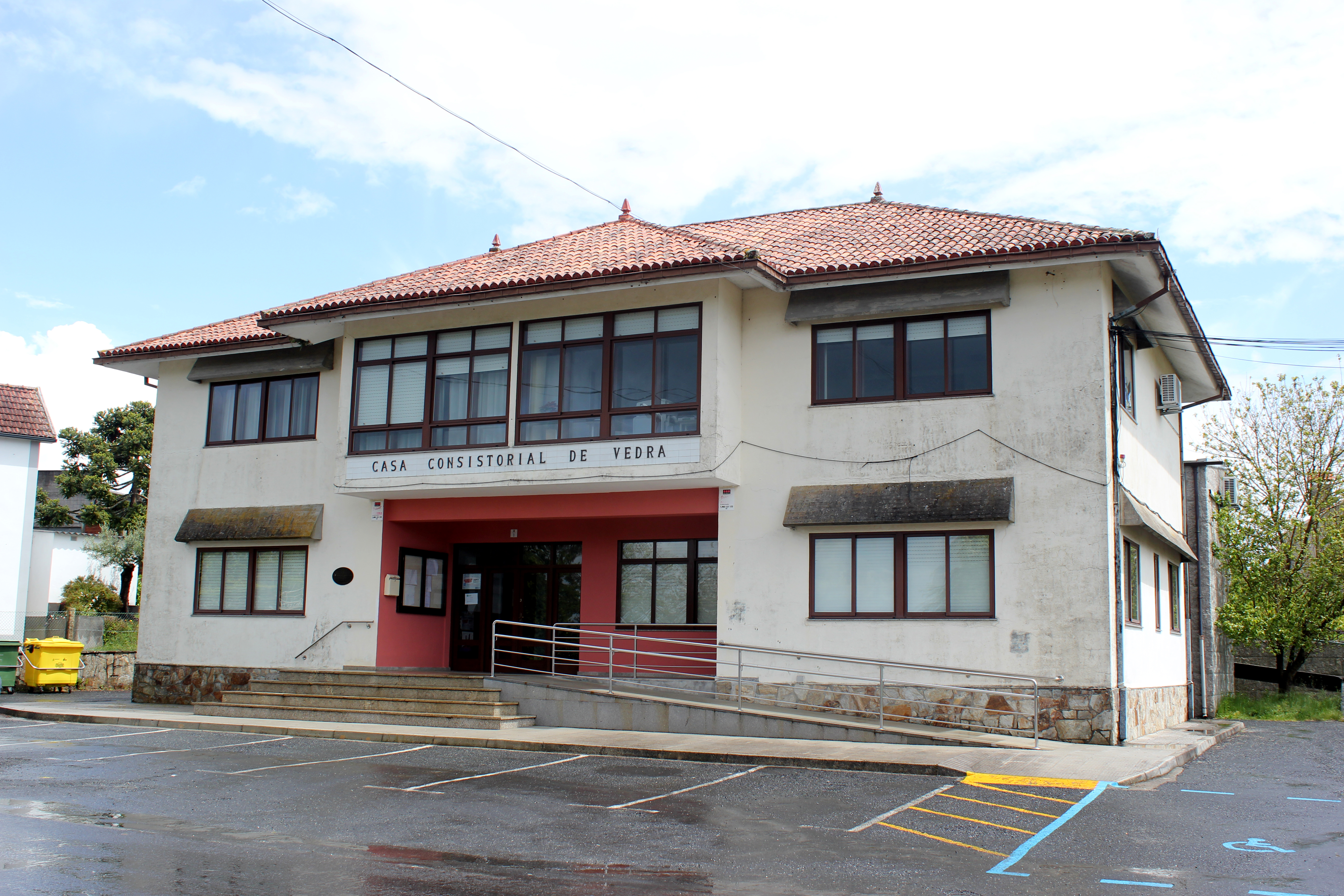 Casa do concello de Vedra.